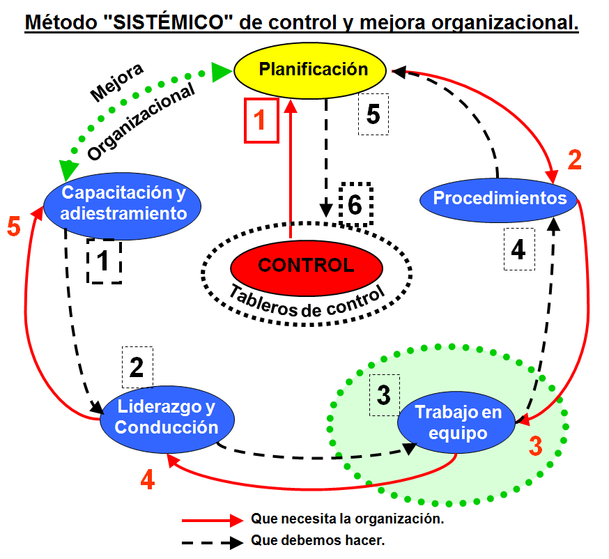 Método de gestión que busca controlar los principales procesos de una organización para luego iniciar aplicar las técnicas de mejora.